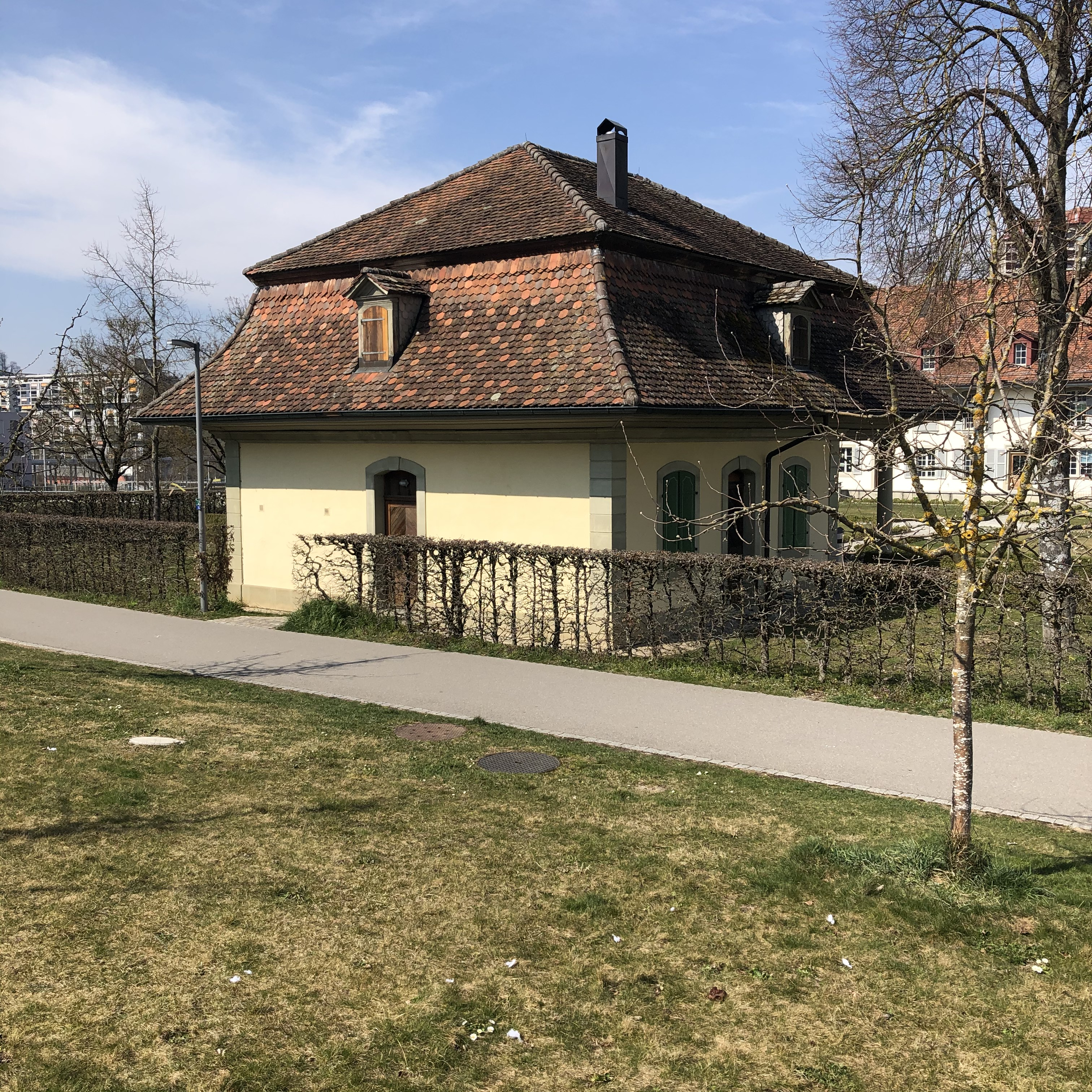 Der Pavillon im Park Brünnengut kann für Veranstaltungen gemietet werden